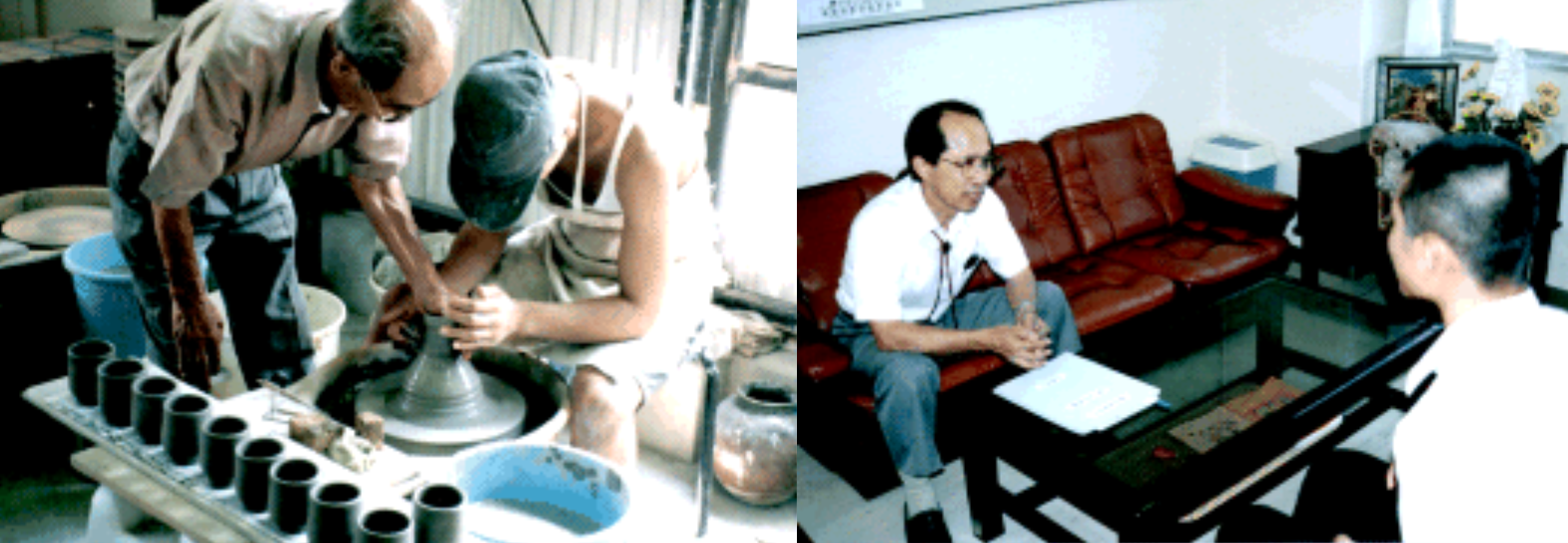 刑務所などでの篤志面接委員の活動